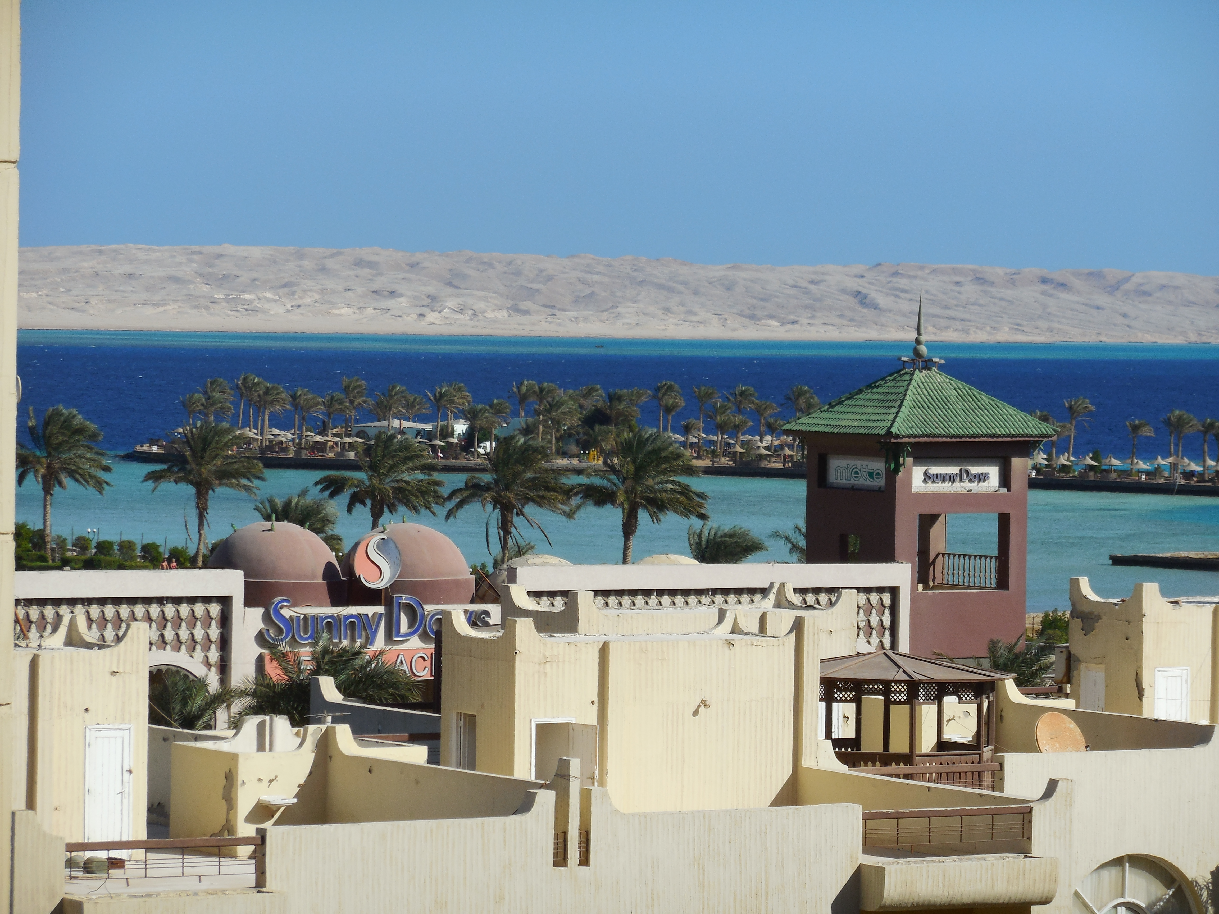 Hurgada